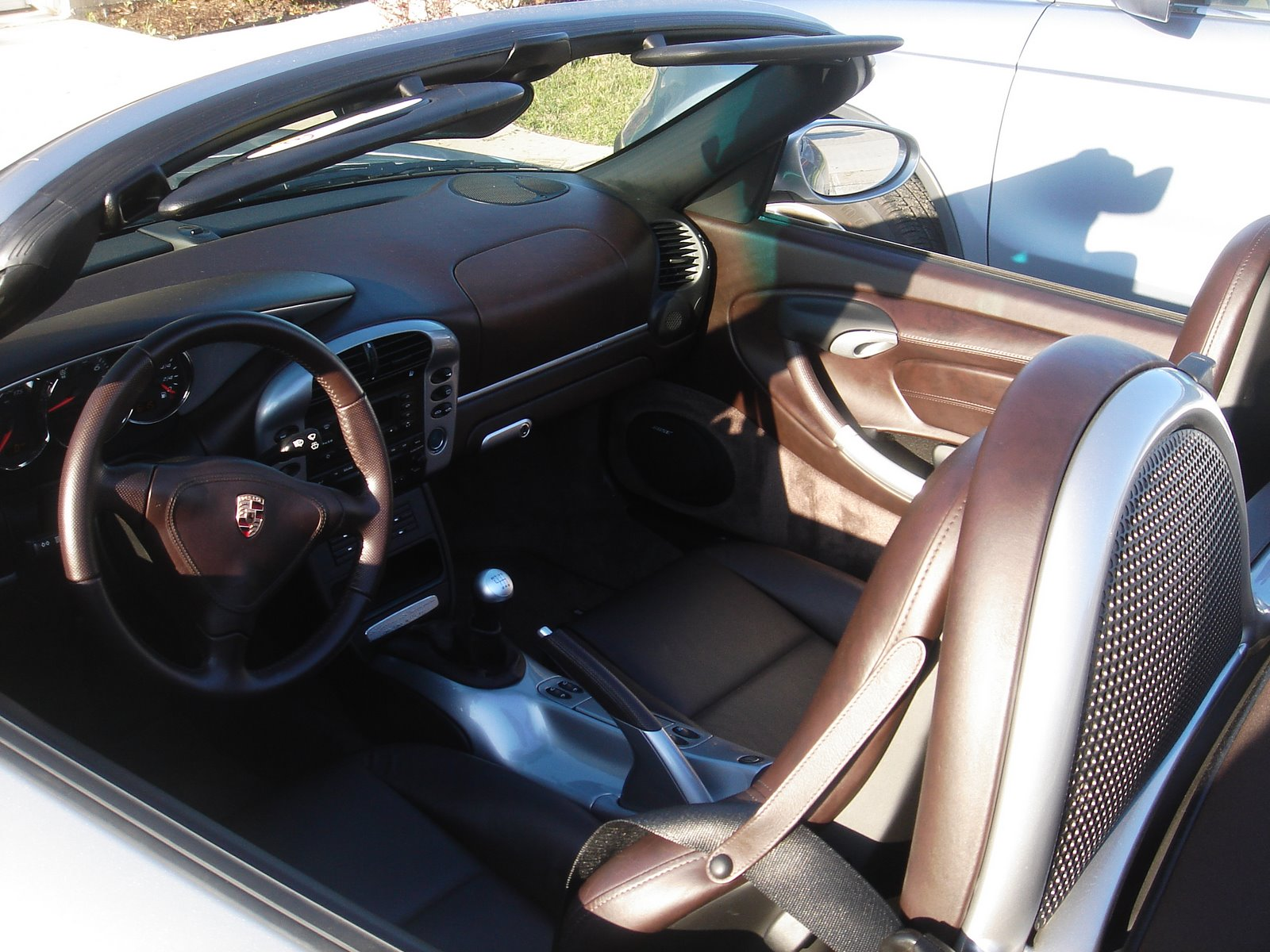 Photographer: Matthew Wolkenberg